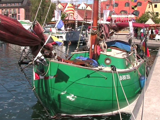 mueritzsail boot